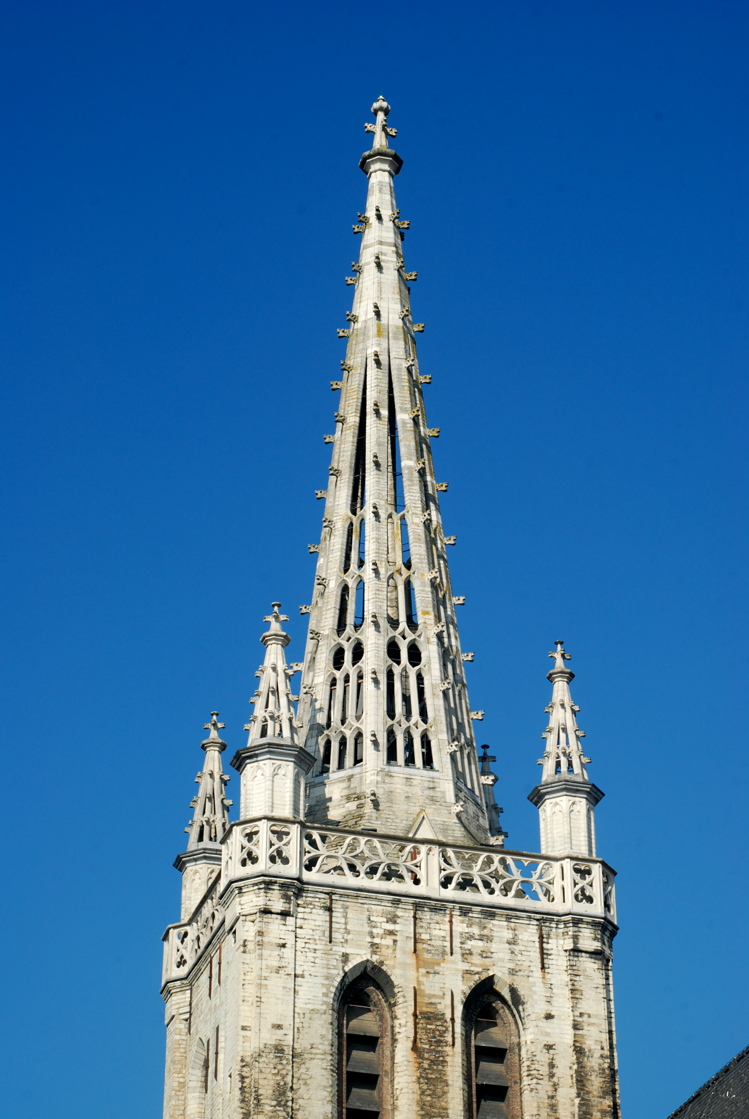 Belgique - Louvain - Église Sainte-Gertrude - flèche de la tour